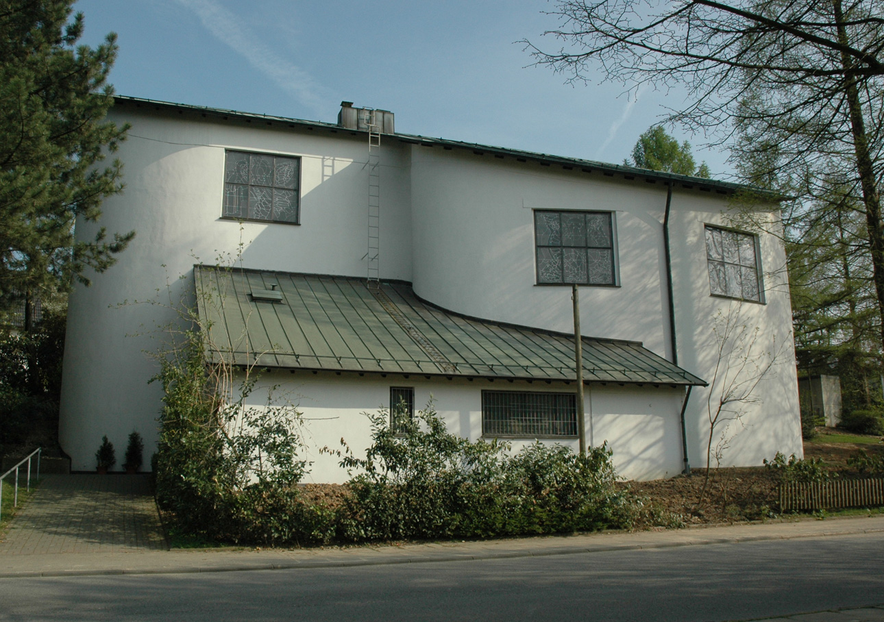 Katholische Kirche Sankt Ludger in Wuppertal-Vohwinkel